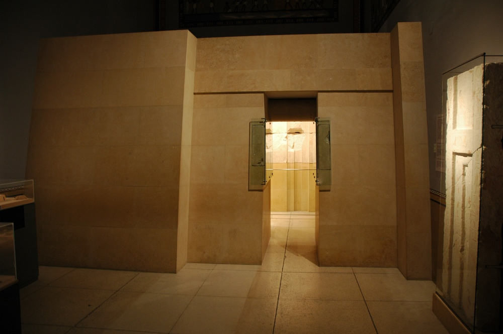 Die Kultkammer des Ka-ni-nisut im Kunsthistorischen Museum Wien von der Mastaba des Ka-ni-nisut aus Giza, Grabung Hermann Junker 1913. Inv.Nr. 8006